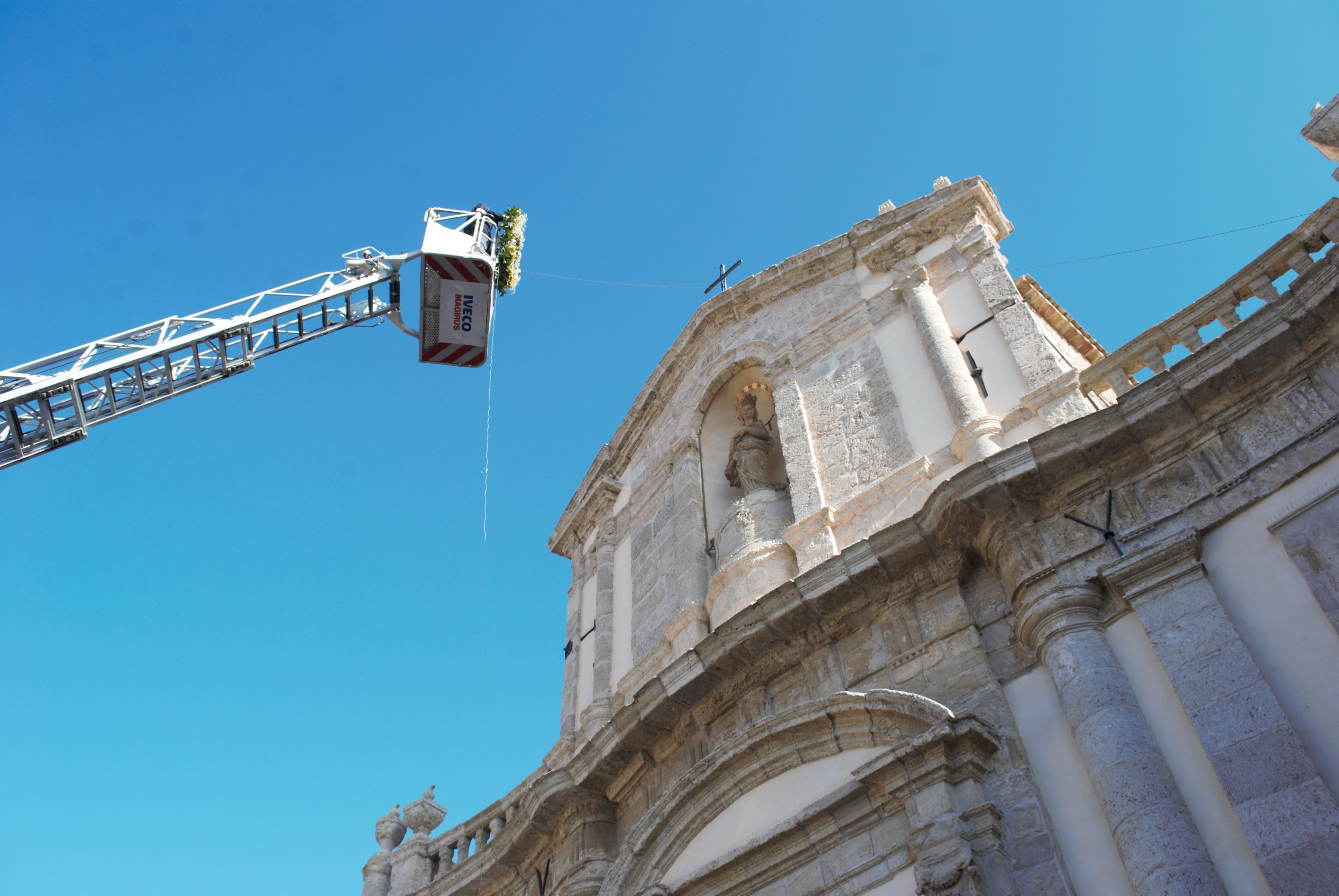 Omaggio floreale della Città di San Cataldo (CL), alla statua dell'Immacolata posta sulla facciata della Chiesa Madre con l'ausilio dei Vigili del Fuoco di Caltanissetta. Anno 2016.